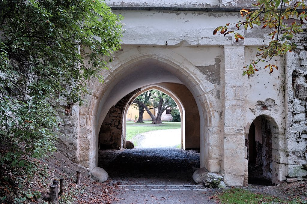 Vstupní brána